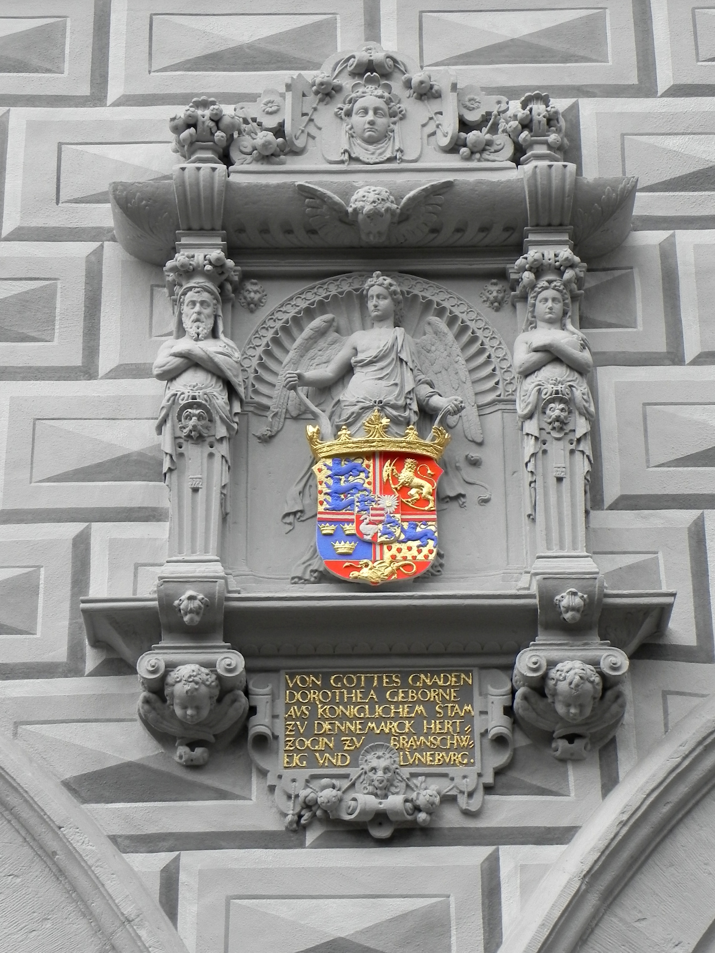 Wappen der Dorothea von Dänemark (1546-1617) an der Vorderfront des Alten Rathauses in Celle